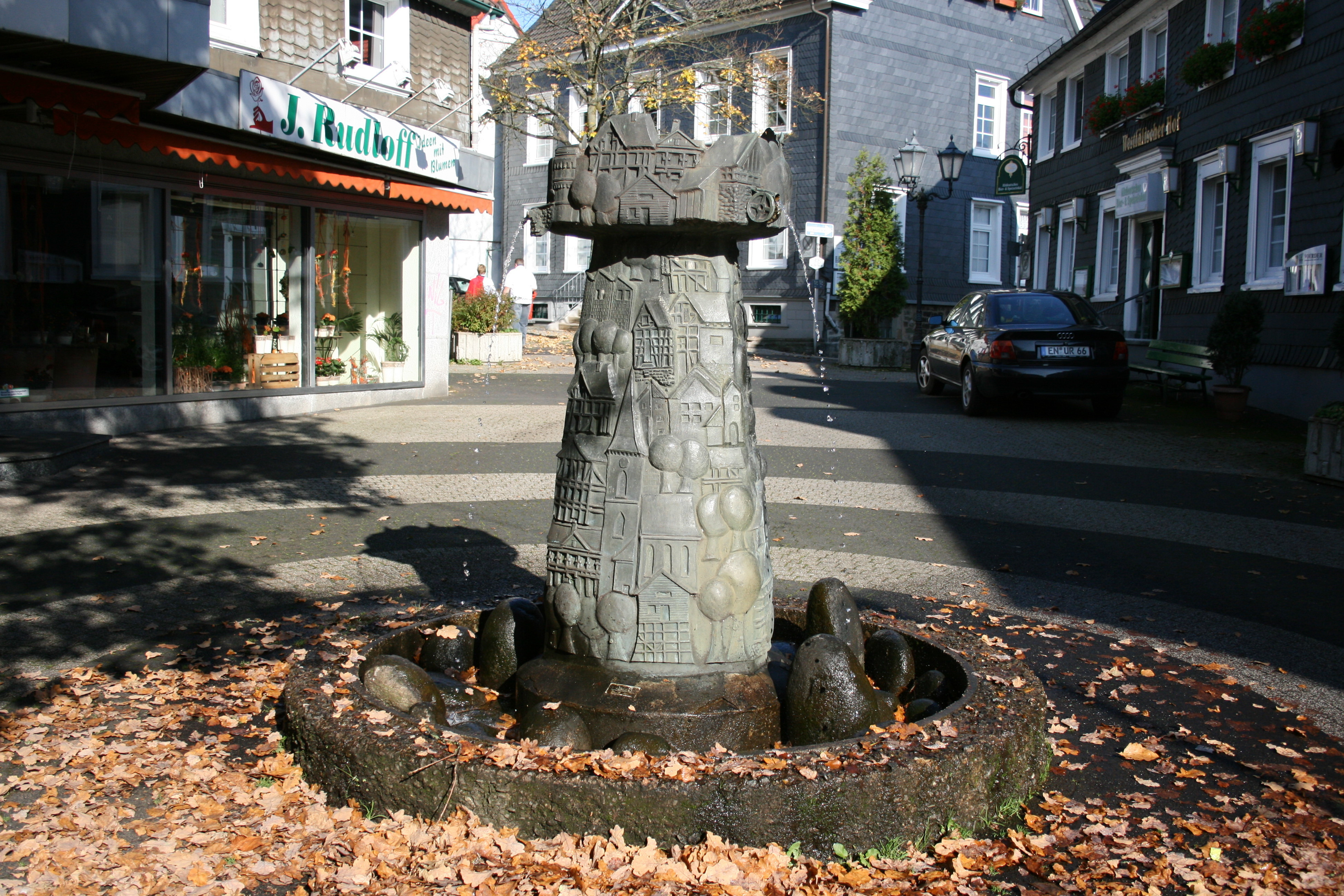 “An der Kirche” in Ennepetal-Voerde